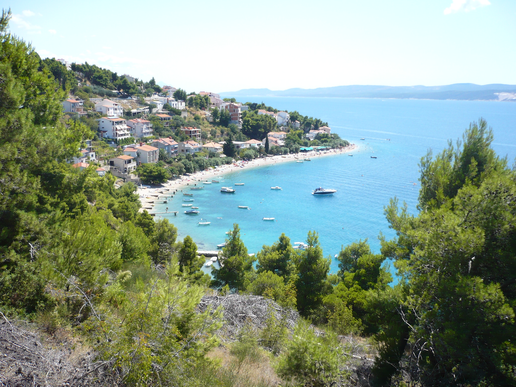 Beach view